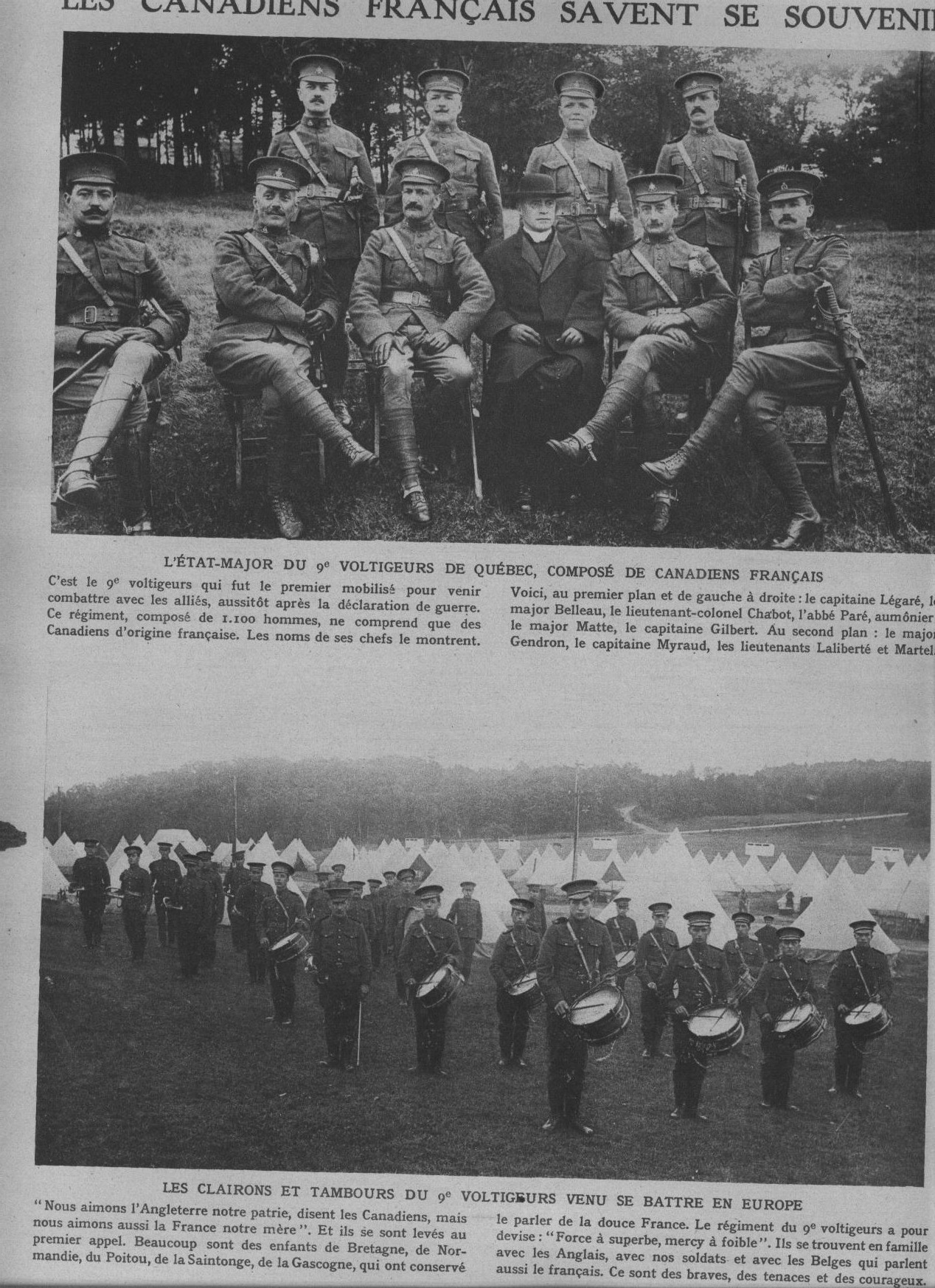 extrait du journal "le miroir".